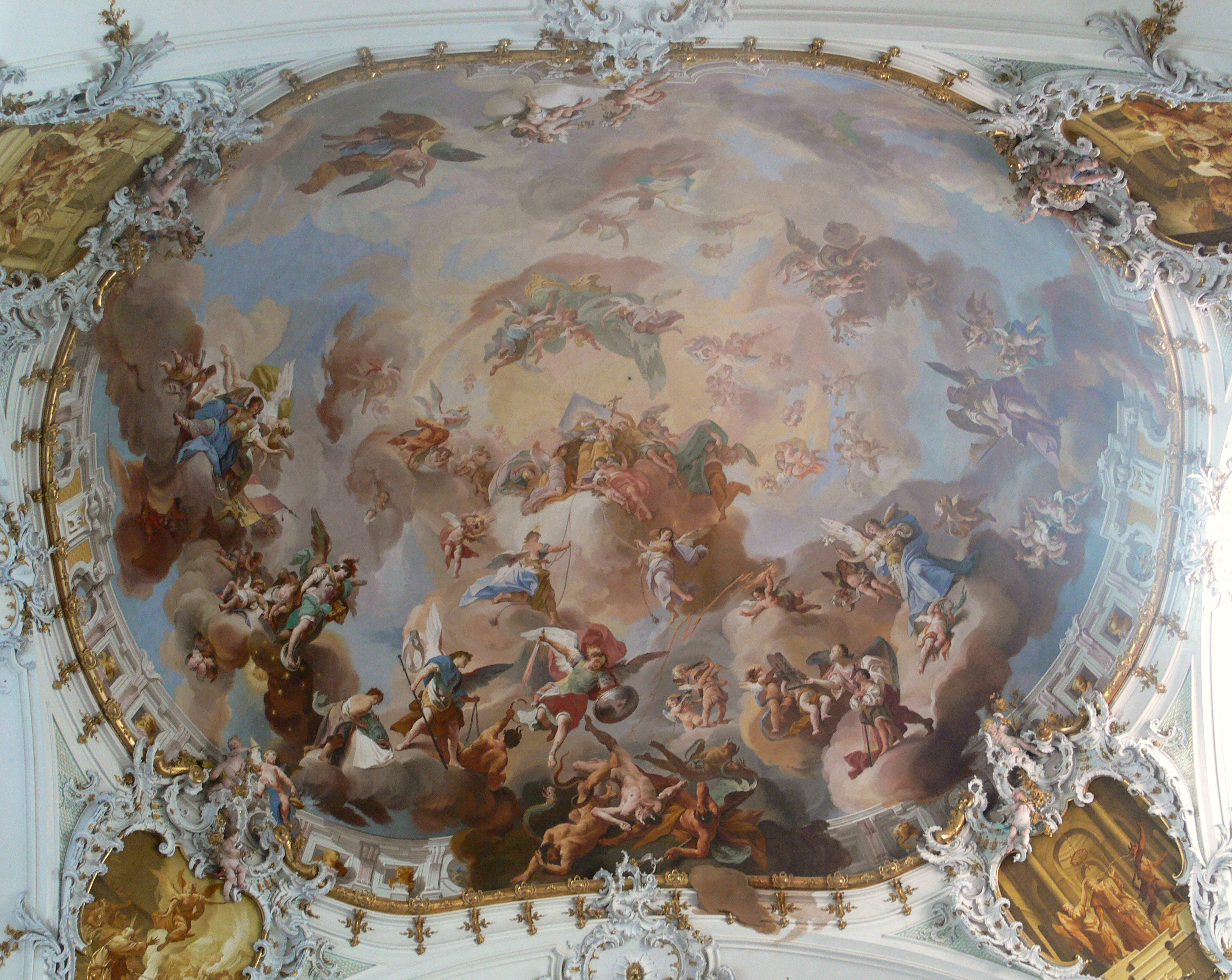 Ottobeuren, Basilika St. Alexander und Theodor: Fresko der „Engelskuppel“ (Johann Jakob Zeiller: Neun Chöre der Engel, 1756) (F 5)